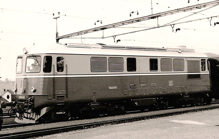 Erstes Exemplar der CFR-Diesellok 060 DA bei Vorführ-Probefahrt in der Schweiz